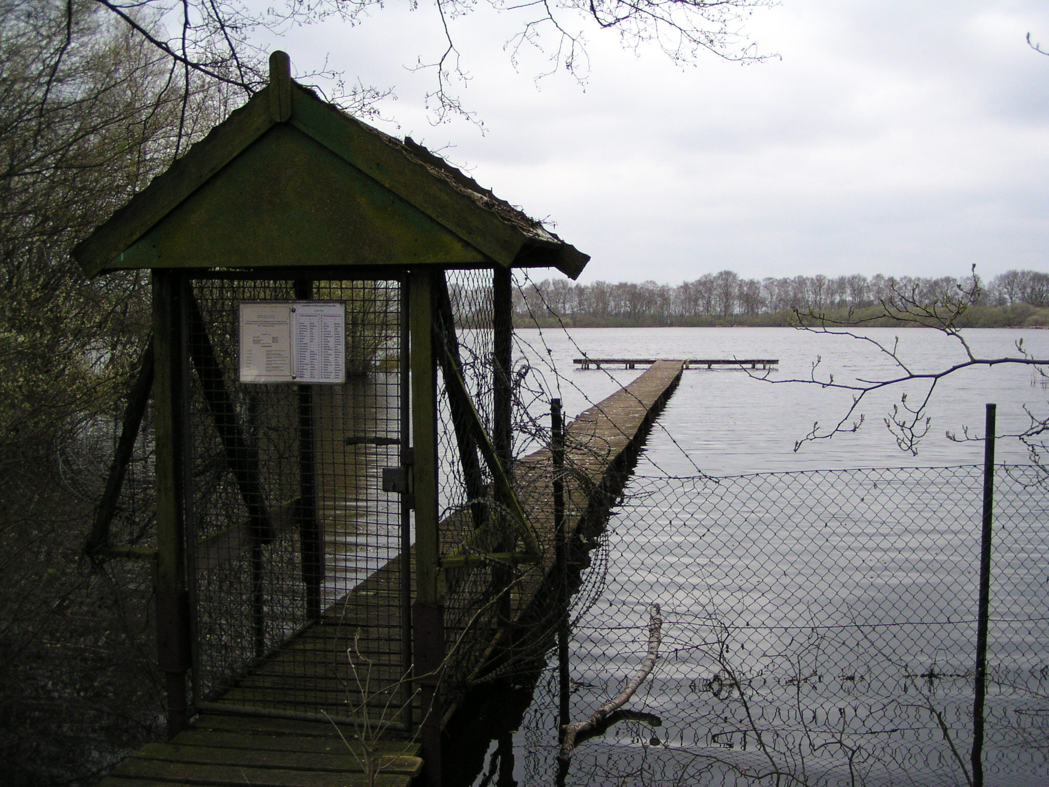 Naturschutzgebiet „Großes Meer“ bei Holte in Donstorf (Ortsteil von Eydelstedt, Landkreis Diepholz, Niedersachsen)